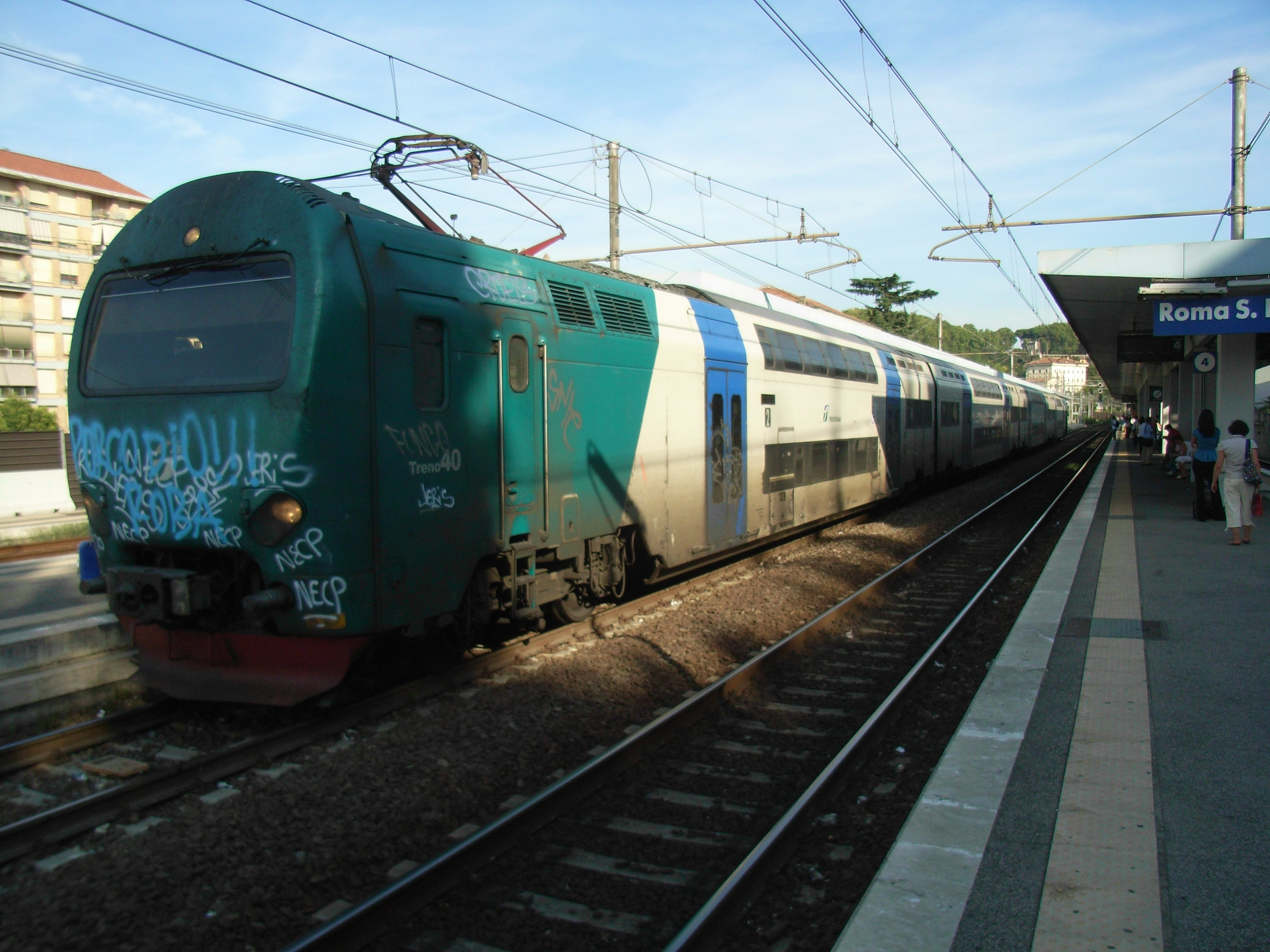 Treno Alta Frequentazione alla stazione di Roma San Pietro